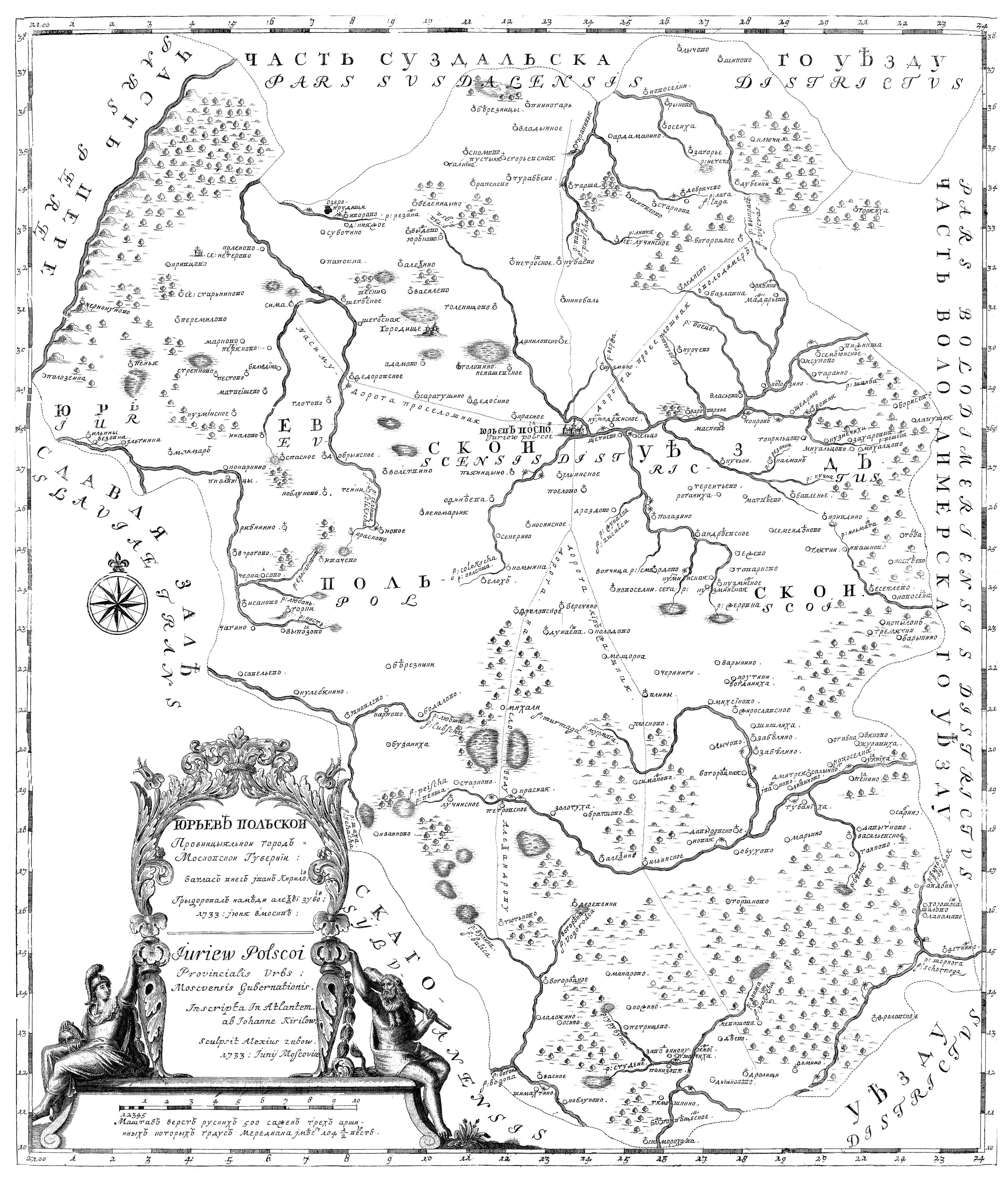 Юрьев-Польский уезд из «Атласа Всероссийской империи» И. К. Кириллова. 1722-1737